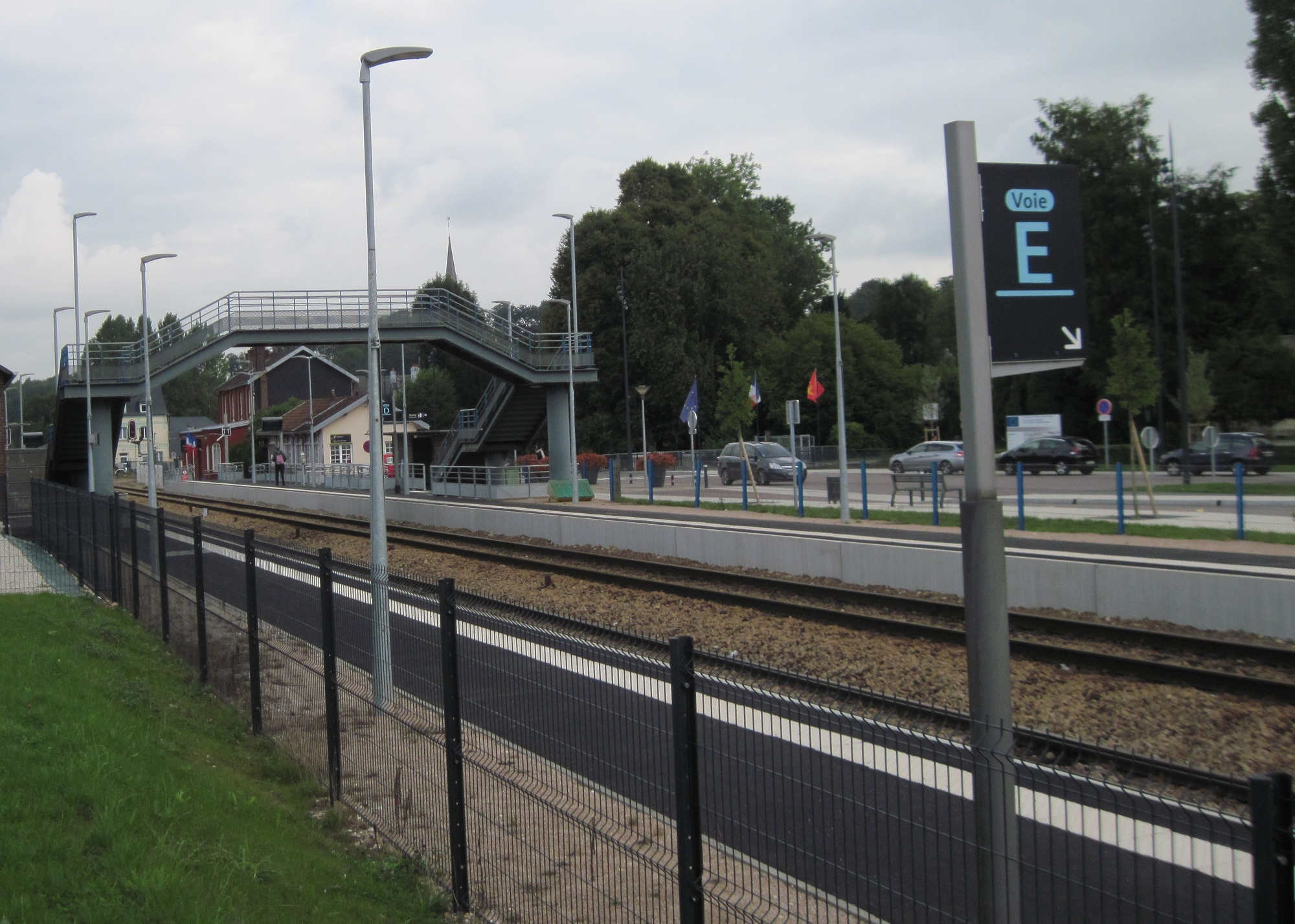 Autre vue de la gare d'Auffay, direction Dieppe